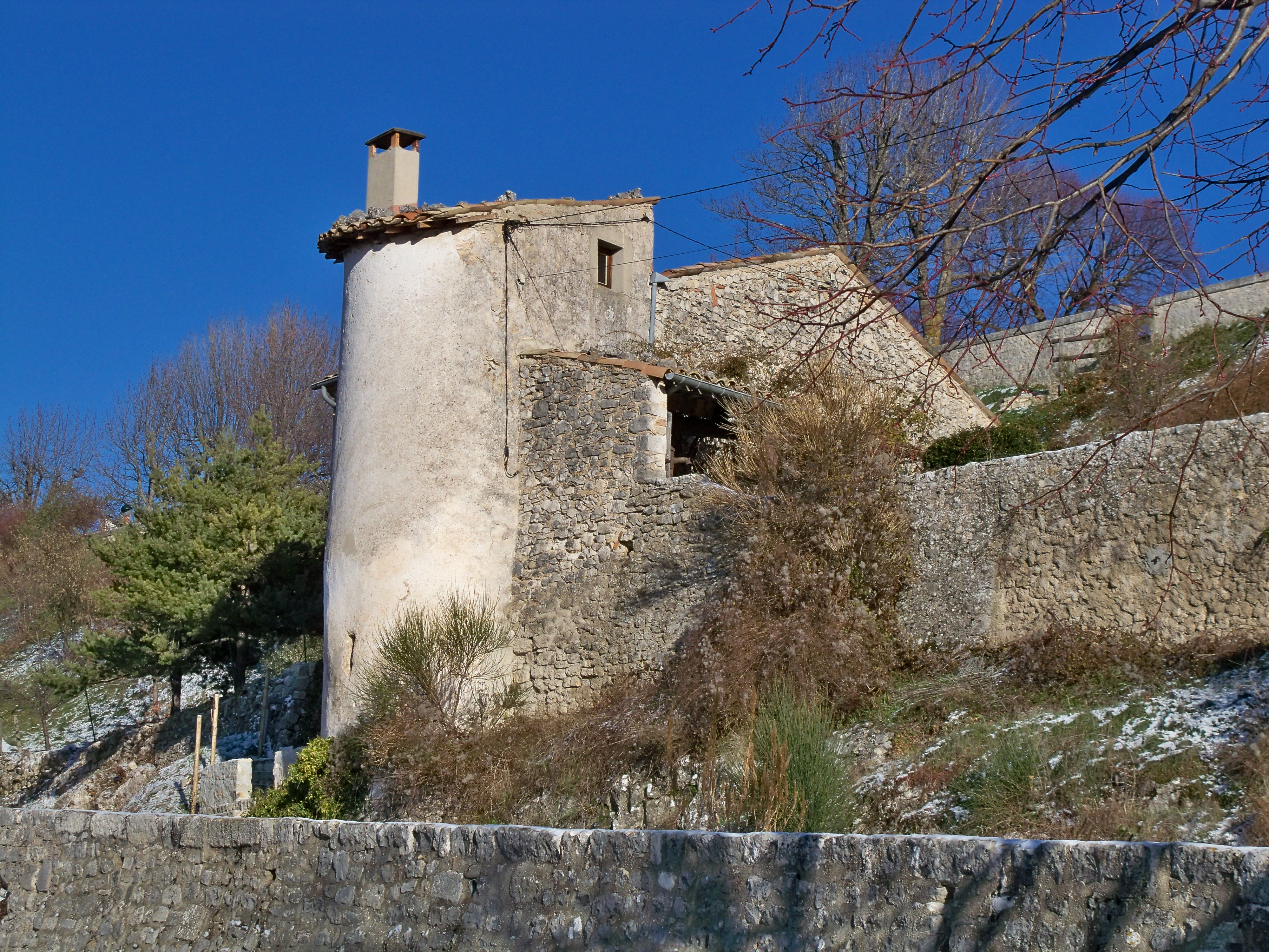 Maison à Tour à Sault (Vaucluse)